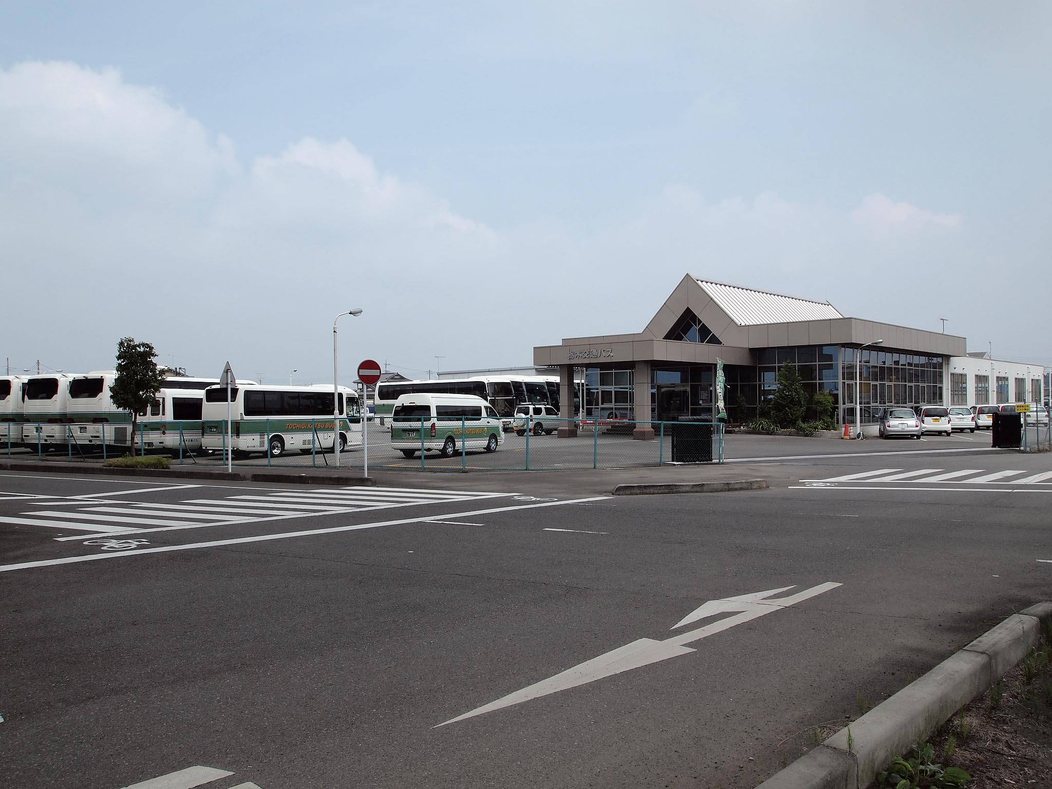 下野市下古山にある栃木交通バスの本社営業所。旧・新日本観光自動車の本社で、北関東自動車道を挟んで南に栃交自動車学校がある。